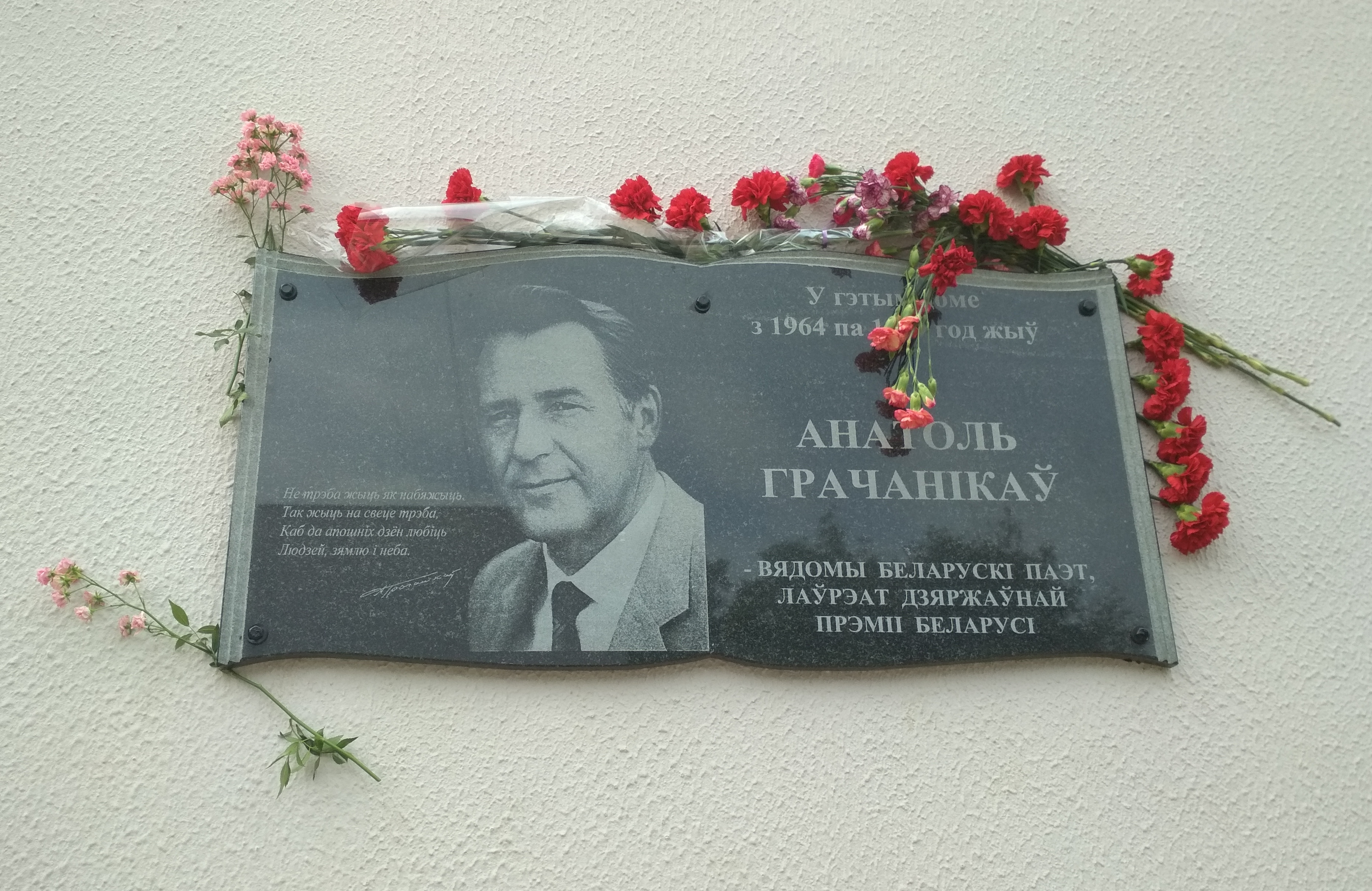 Мемориальная доска А.С. Гречаникова в г. Гомеле, Беларусь, ул. Пушкина, 2А. Открыта 7.09.2018